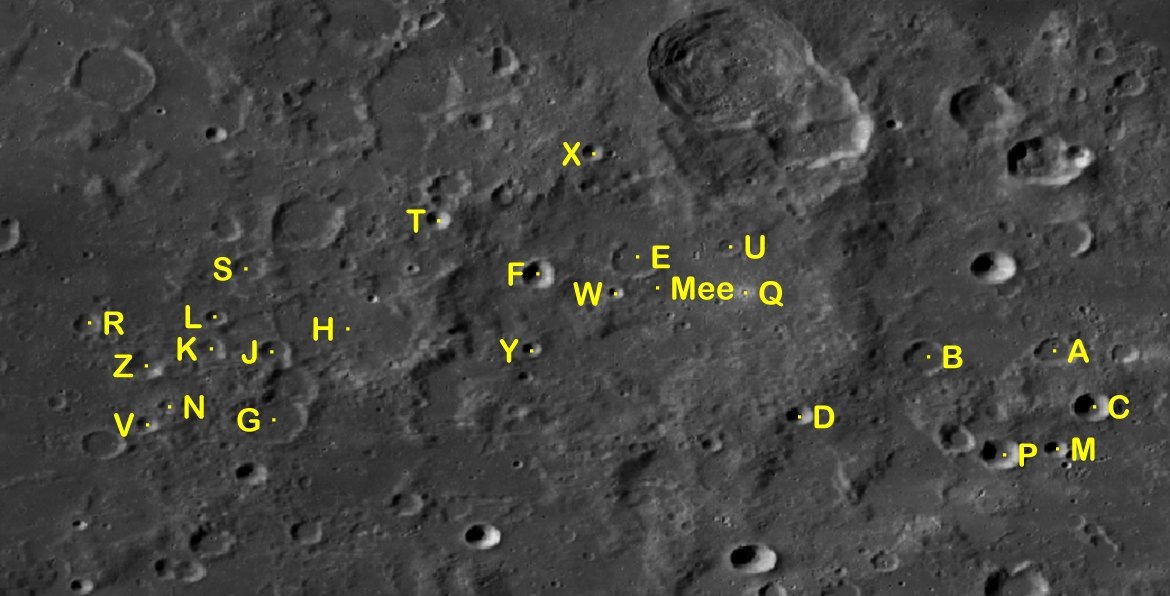 Cráter lunar Mee. Cráteres satélites. (Imagen LRO)